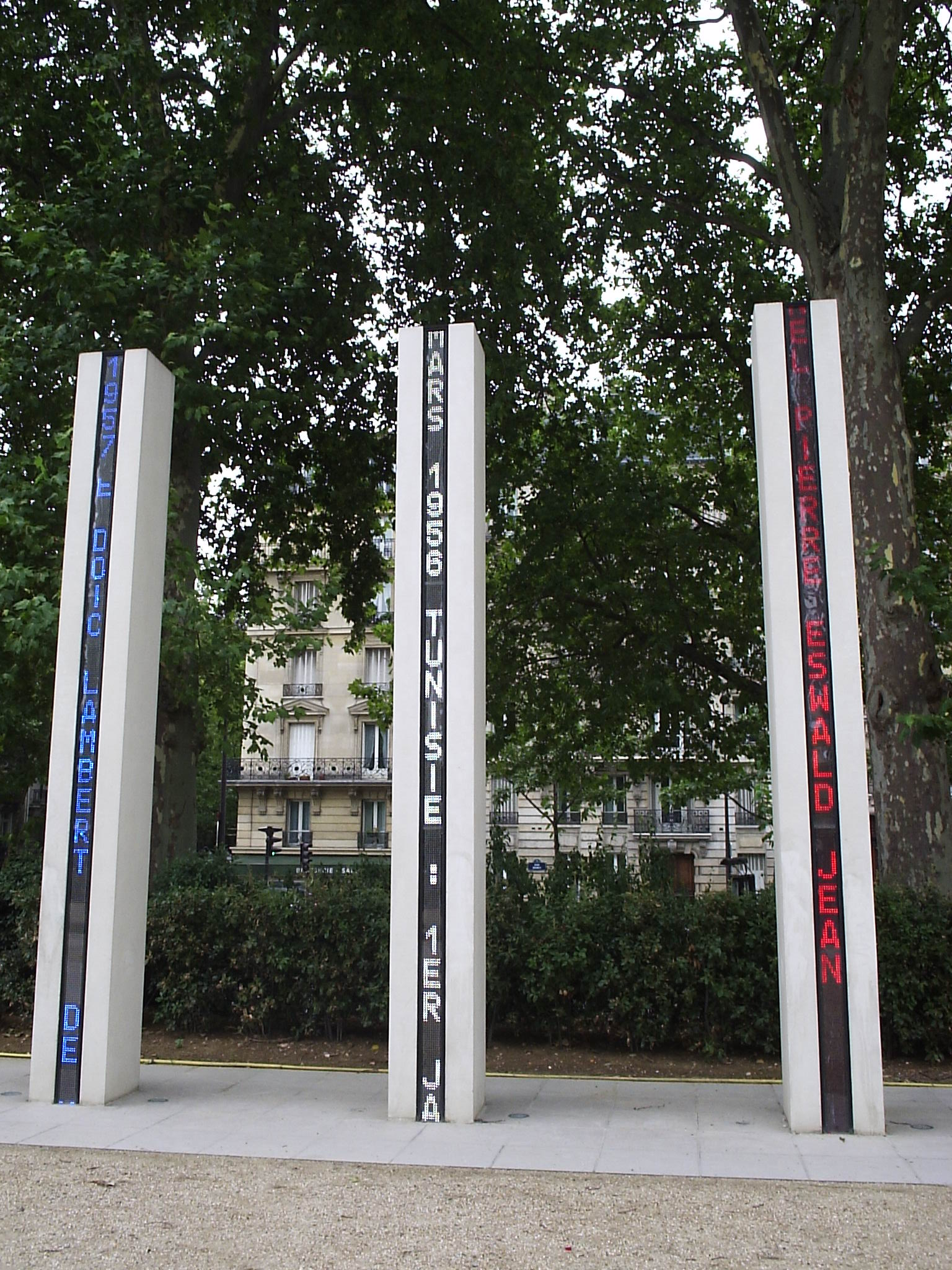 Description : Mémorial de la Guerre d'Algérie à Paris, 7e près du quai Branly. Ce mémorial est l'oeuvre de l'artiste Gérard Collin-Thiébaut Author : Sebb Date : 08/08/2006